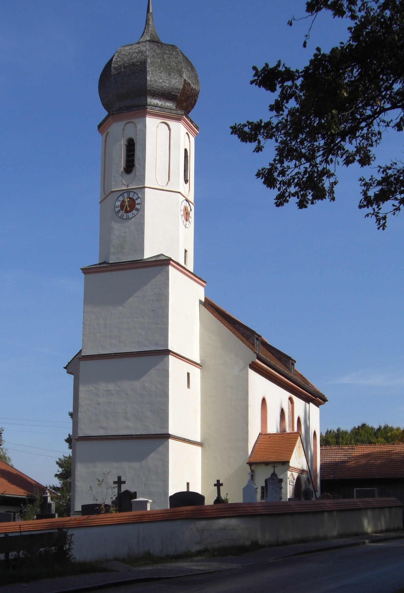 Steingau in der Gemeinde Dietramszell, Filialkirche St. Martin